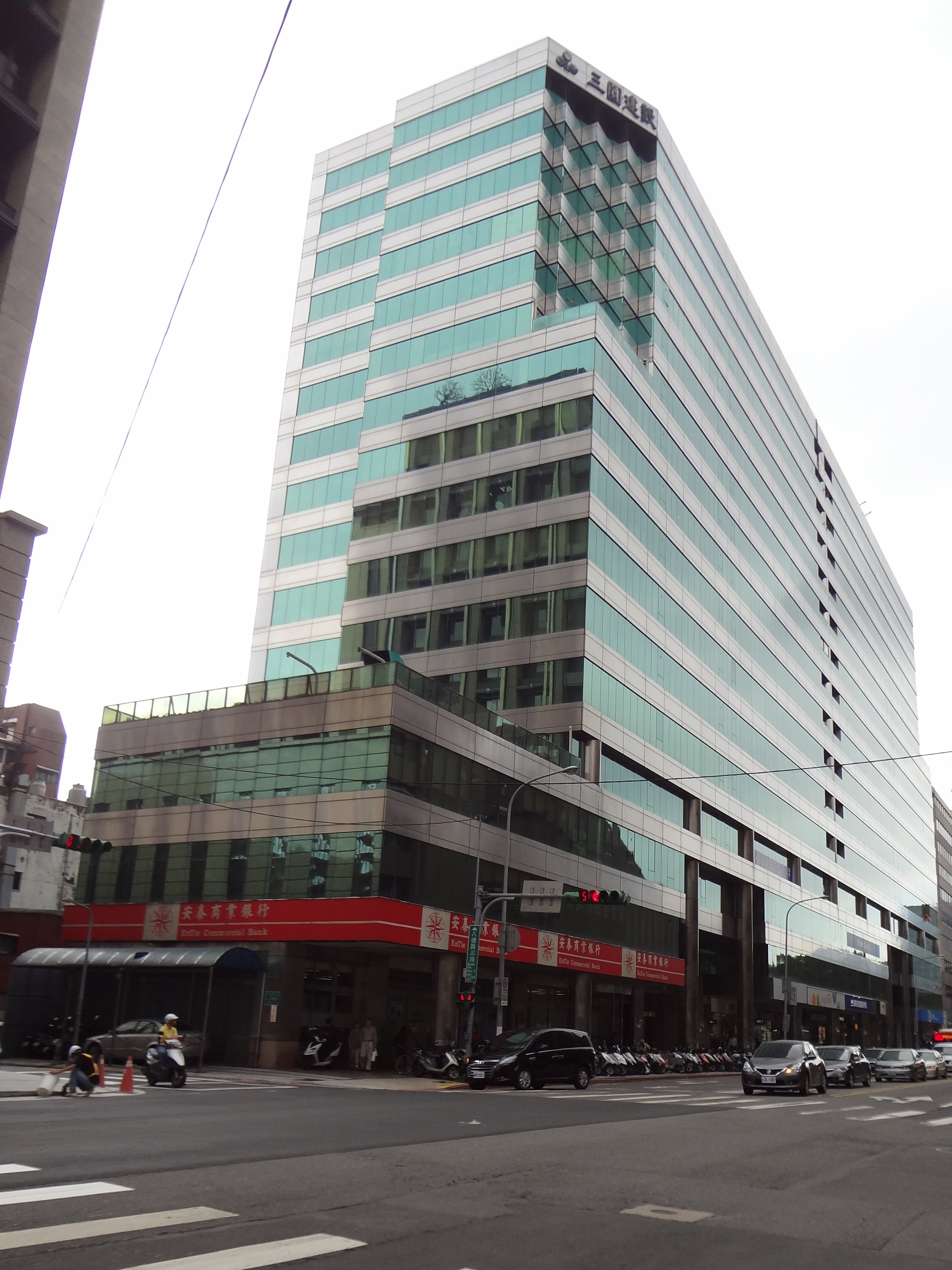 敦北長城大樓，三圓建設建造。民間全民電視公司總部在14樓，安泰商業銀行中崙分行在1樓，中華職棒總部在2樓。